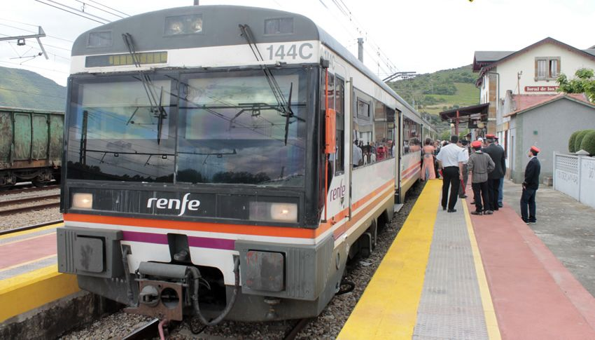 Todo listo en la estación de tren de Toral de los Vados para iniciar viaje de la unidad de la serie 470 de Renfe Operadora, con motivo de la decimotercera edición de "Toral en Tren".